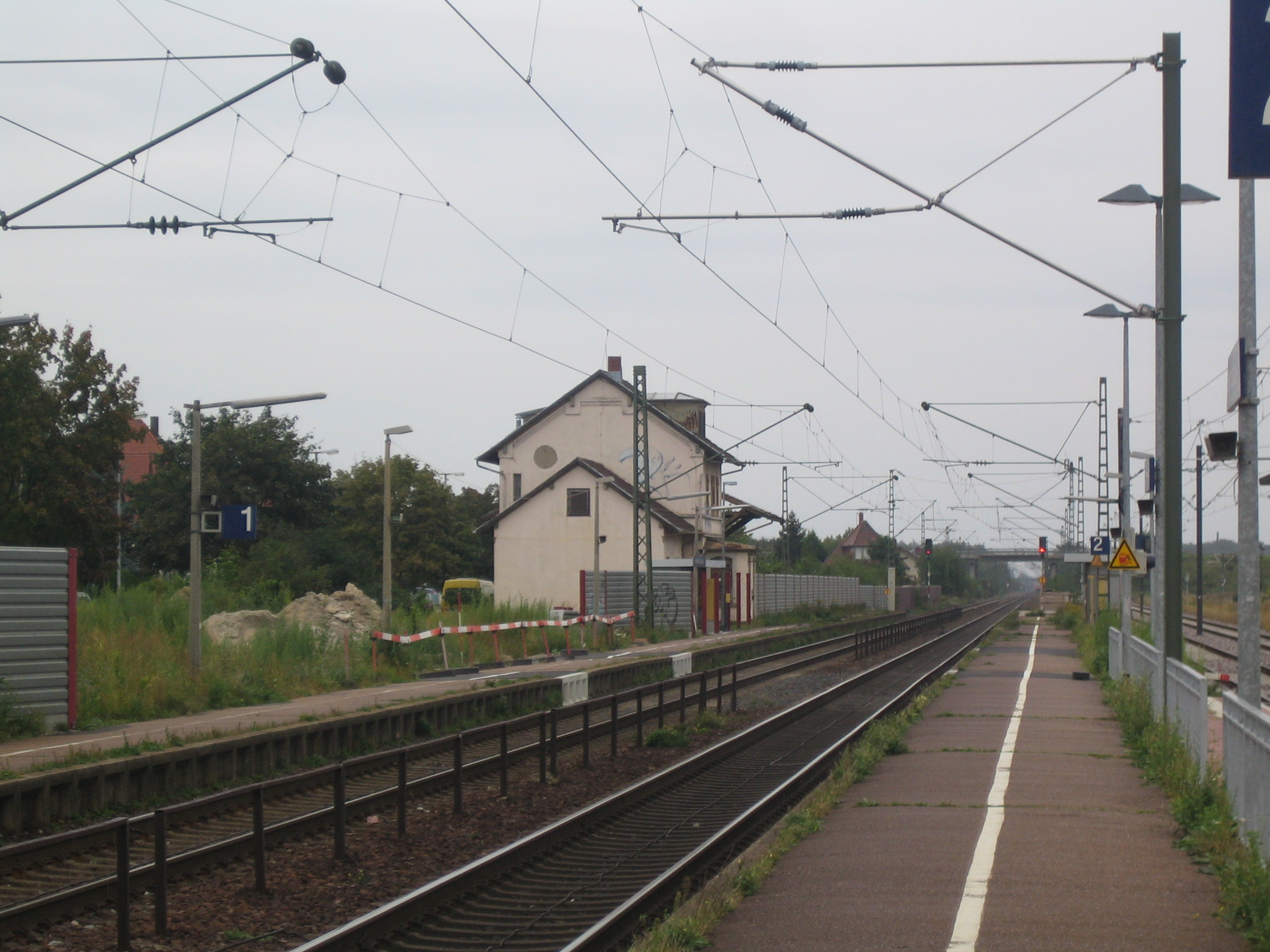 Bahnhof Friedrichstal (Baden)